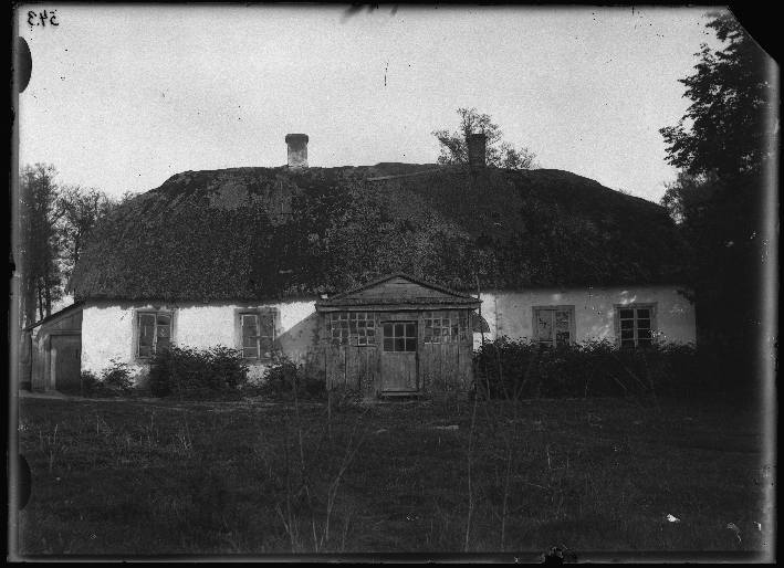 Беларуская (тарашкевіца): Бердуны (Bierduny), сядзіба Кляноўскіх (Klijanoŭski)